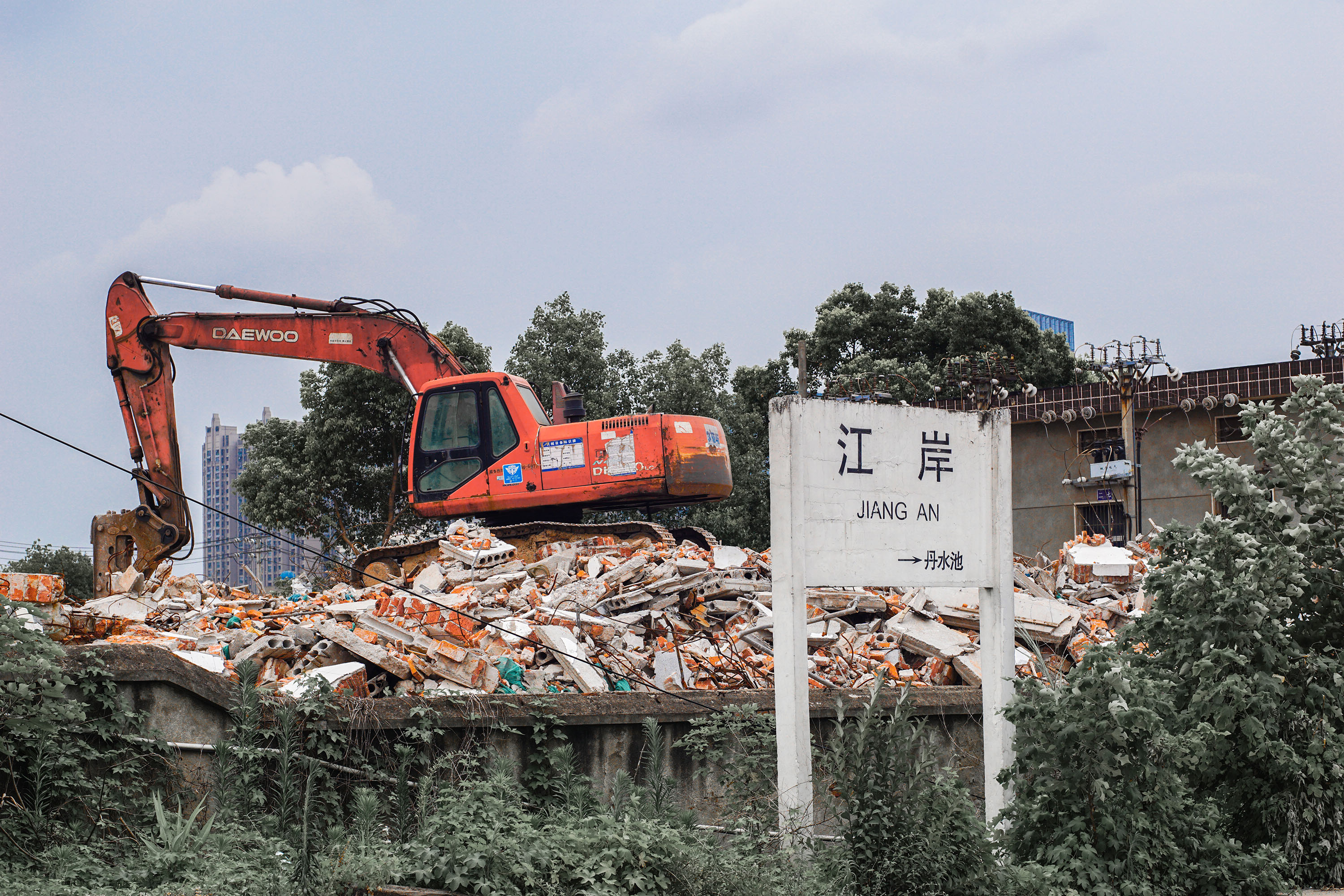 江岸站站牌